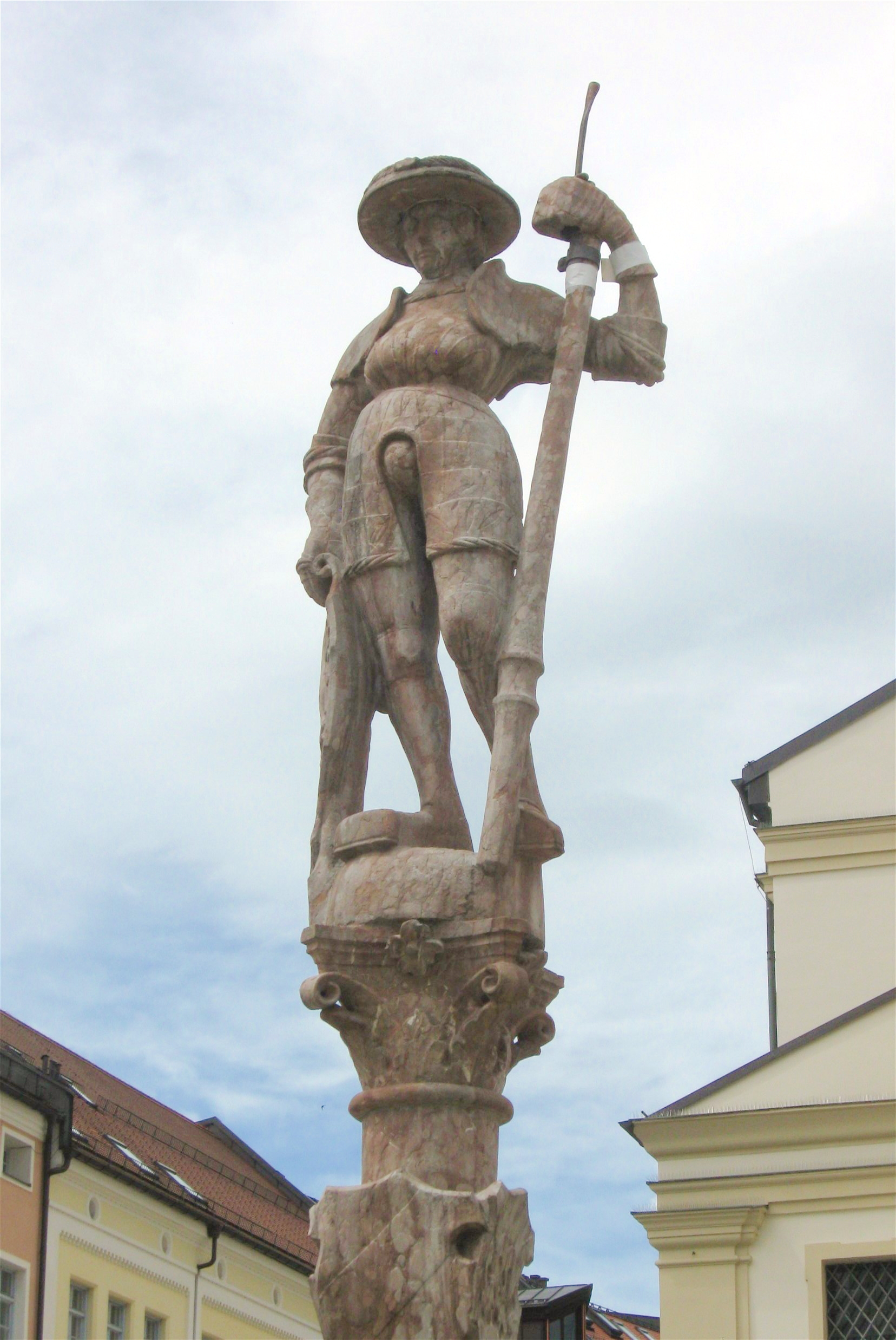 Stadtplatz; Lindlbrunnen, Brunnensäule mit Rotmarmor-Figur, von Meister Steffan errichtet, 1525/26, Brunnenbecken von 1646.